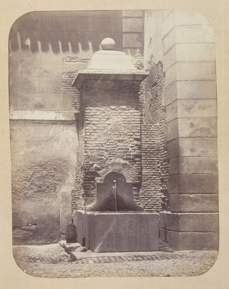 Fuente en la calle del Rosario (Madrid). Obra en 1864 del fotógrafo toledano Alfonso Begué, muerto el 31 de octubre de 1865. Cartulina sepia. Albúmina. 43 x 32 cm. Fotografía contenida en un álbum procedente del Archivo de Villa y trasladado al Museo de Historia en 1983.